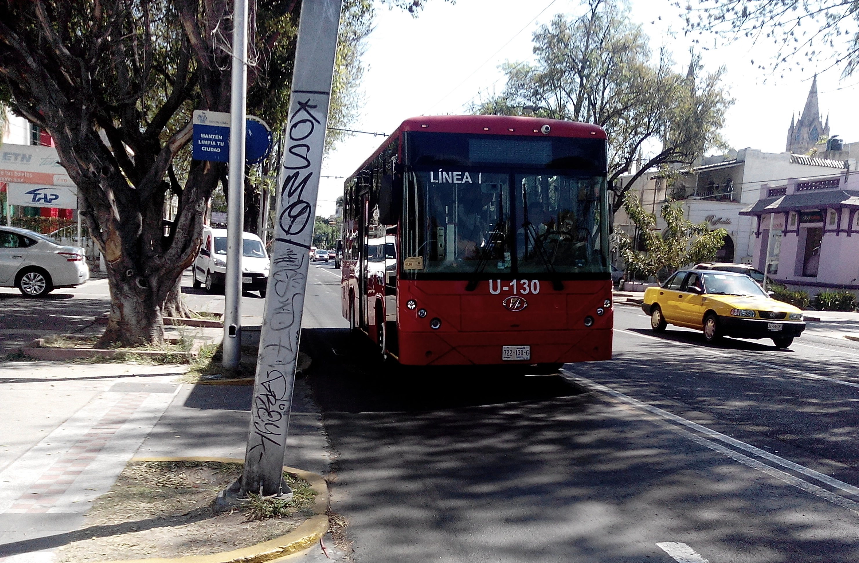 Autobús urbano en Guadalajara, México